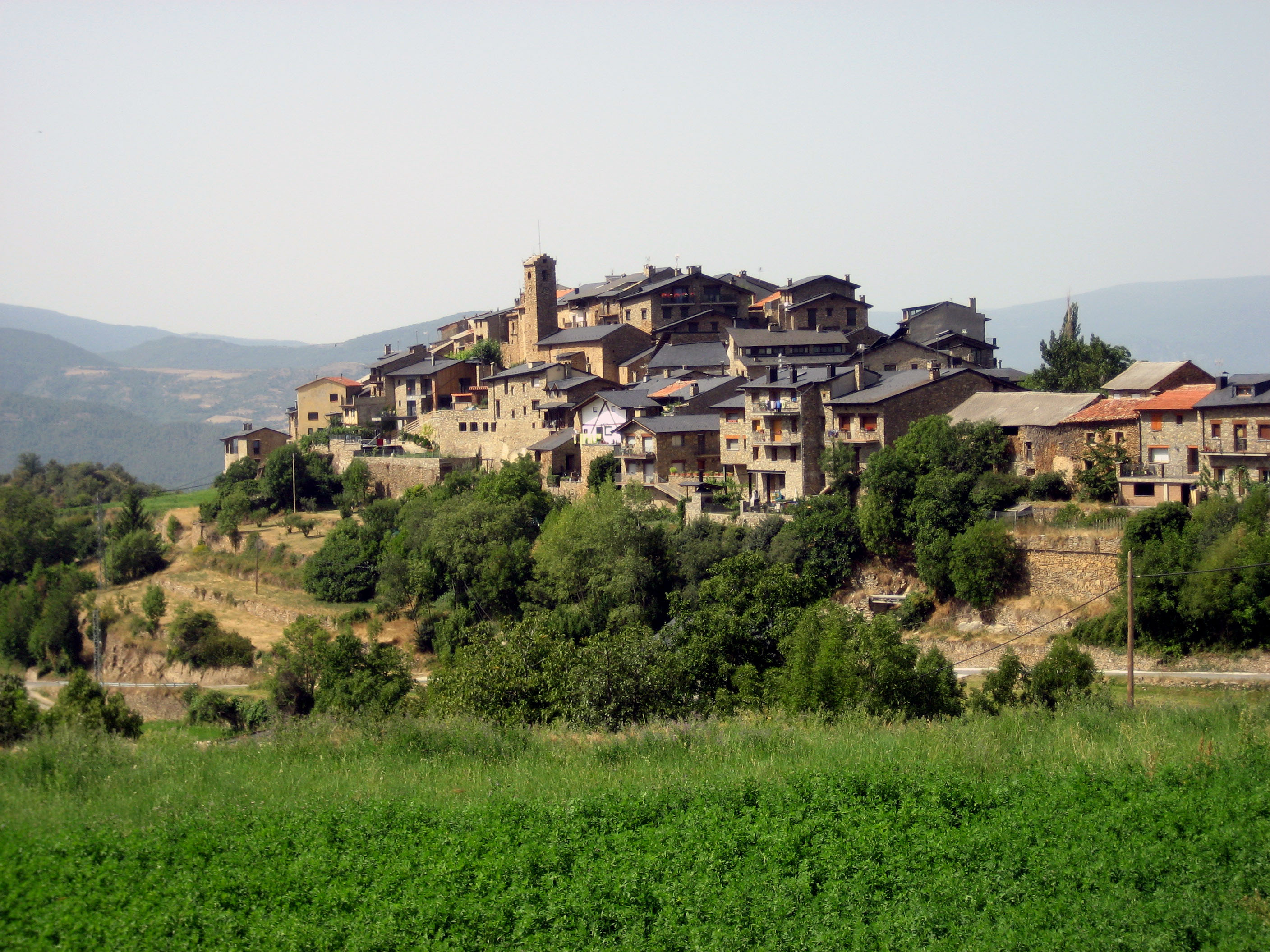 Vista general del pueblo de Estamariu perteneciente a la comarca del Alto Urgel, provincia de Lérida. Cataluña. Spain